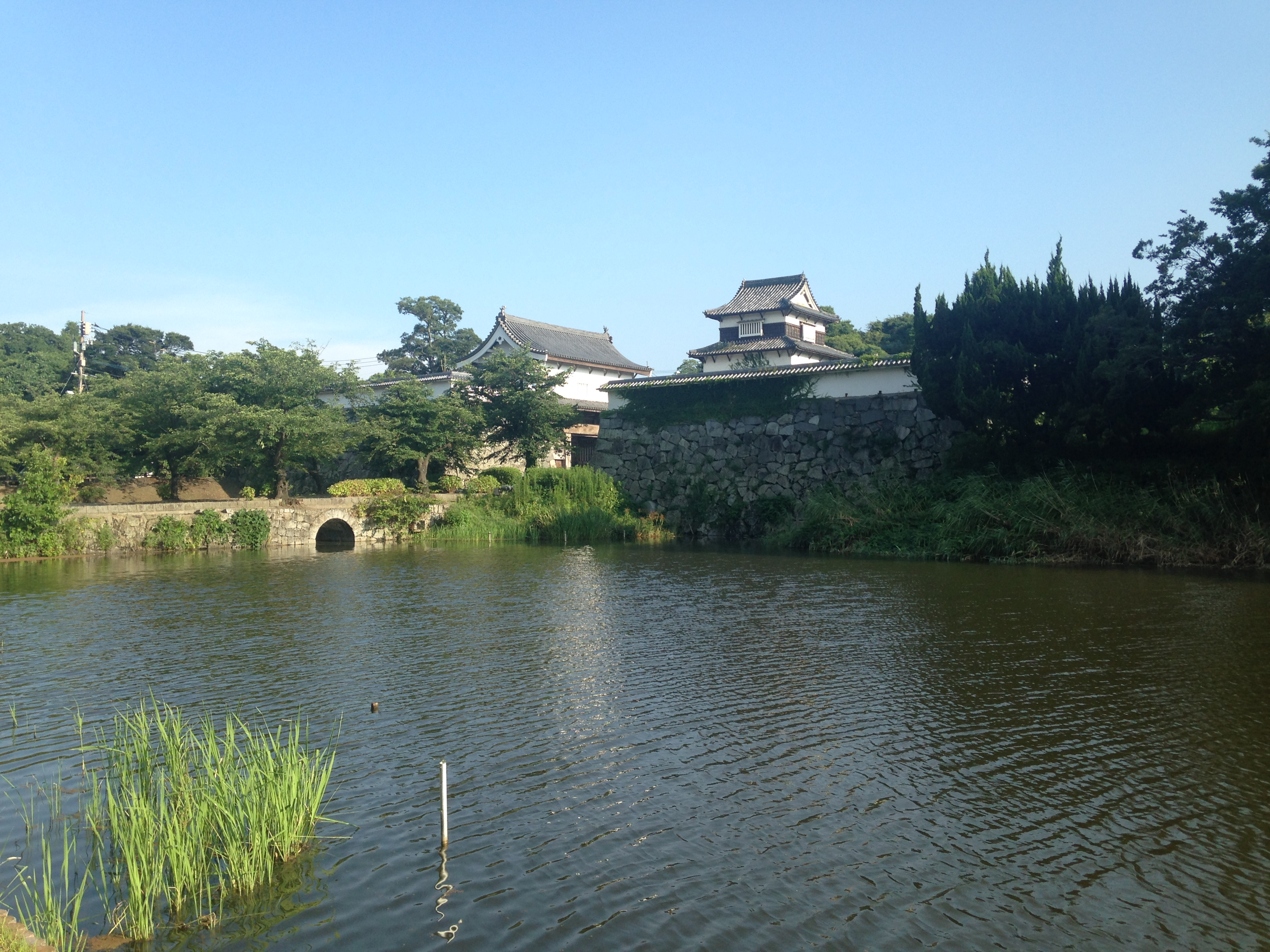 福岡城の下之橋御門(大手門)と水堀